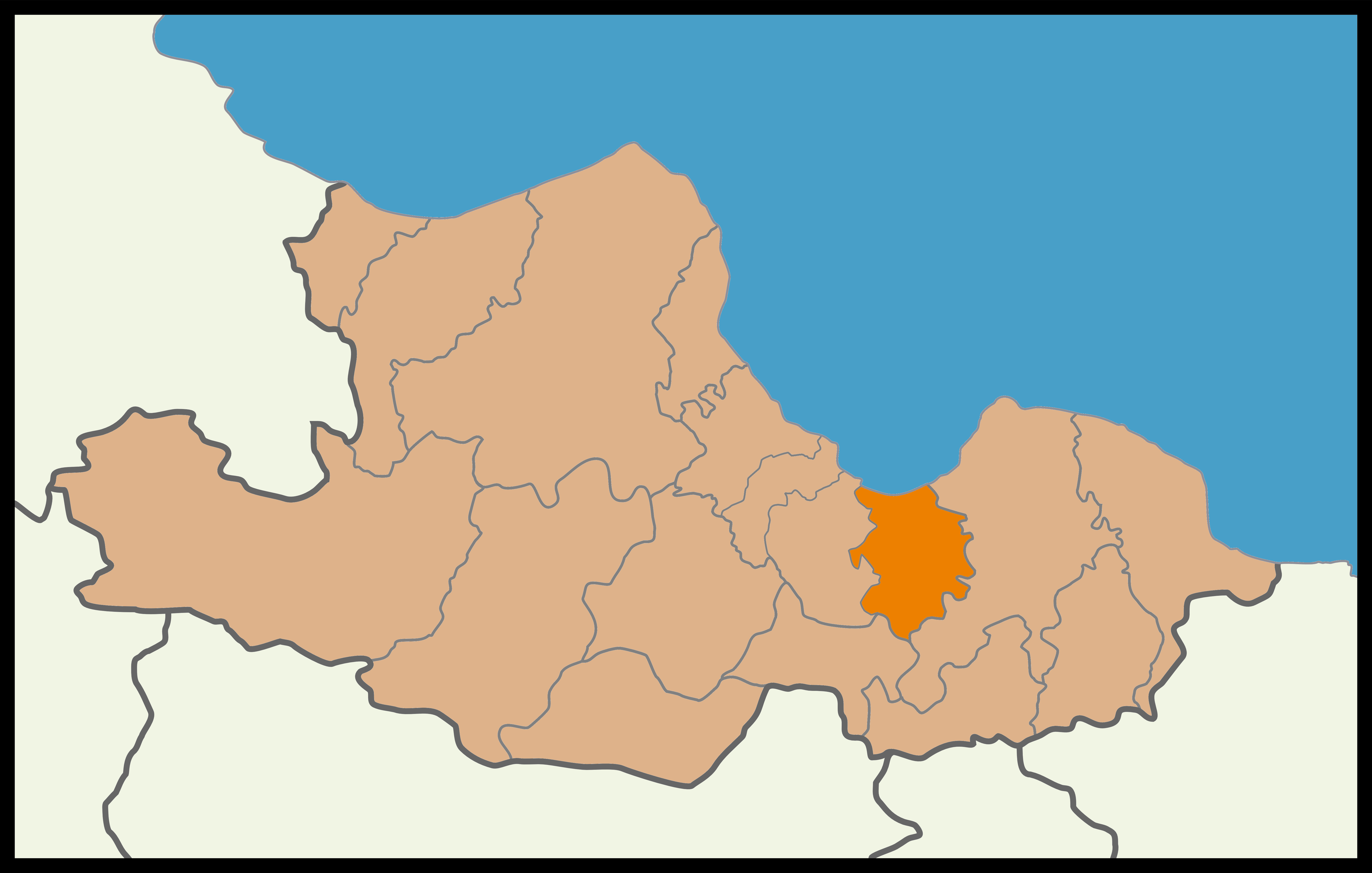 Samsun'un Tekkeköy ilçesinin 2014 Türkiye yerel seçimleri haritası.